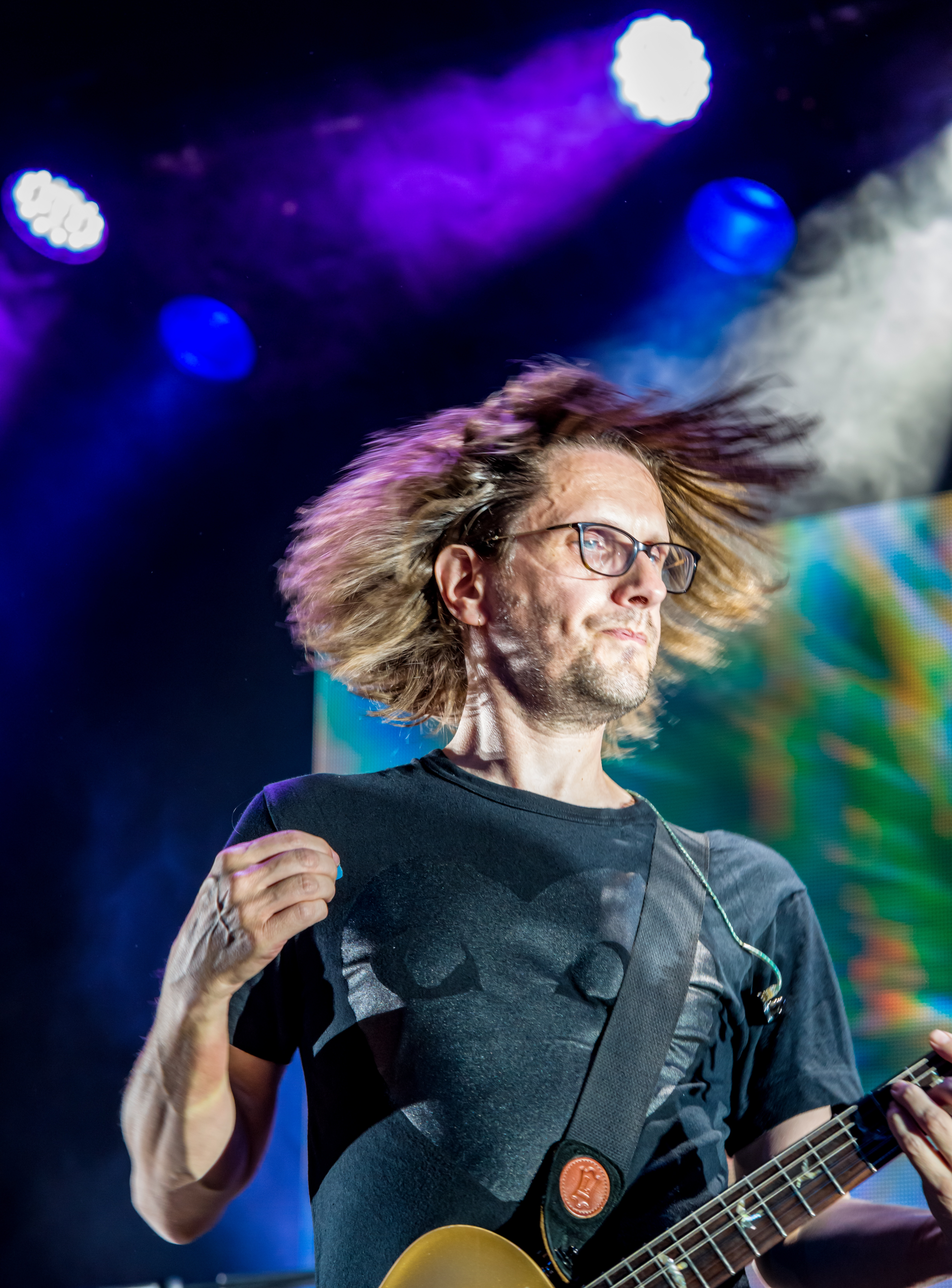 Bilder vom Zelt Musik Festival 2018 in Freiburg im Breisgau Das Eröffnungskonzert mit Steven Wilson